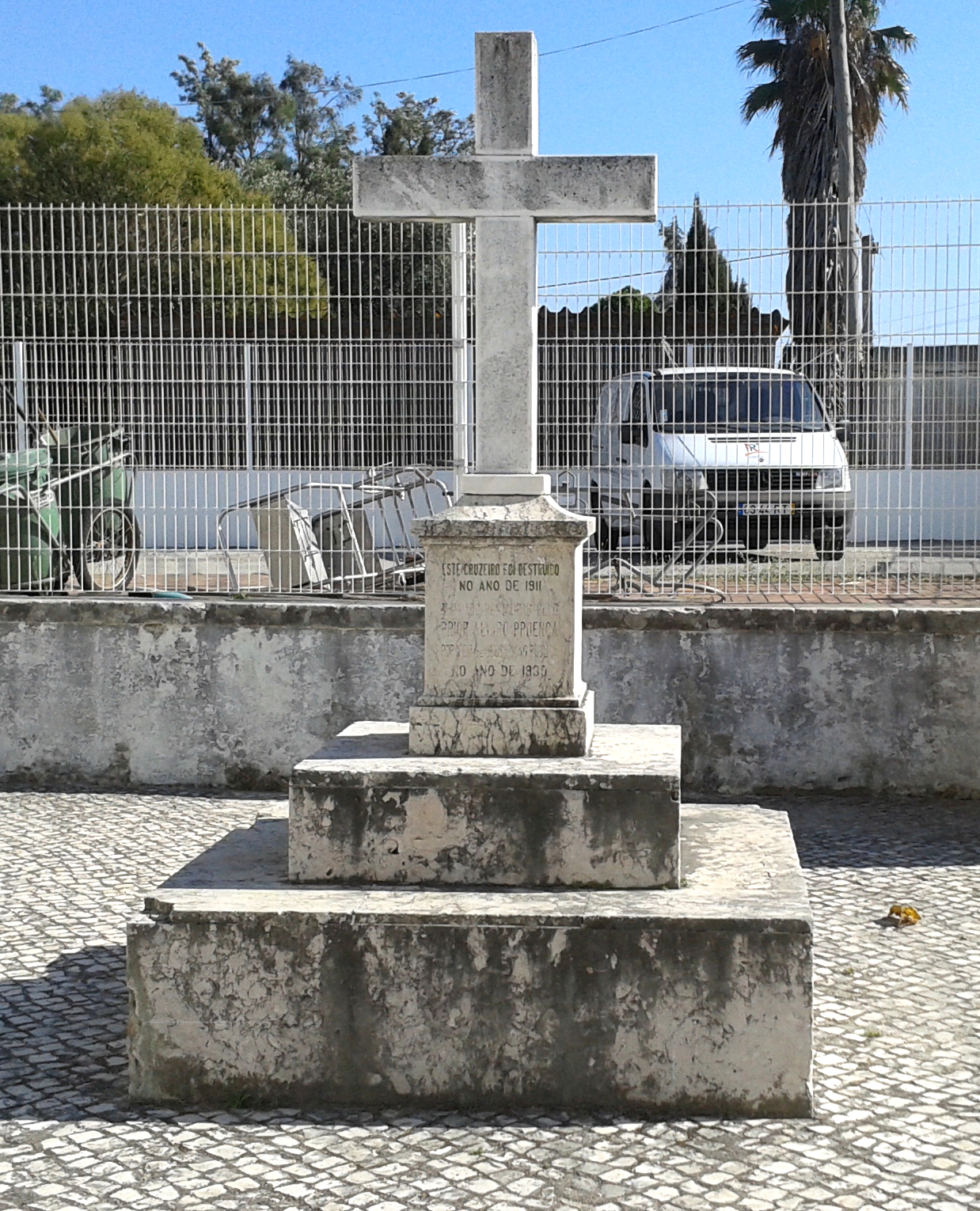 Cruzeiro de São Julião do Tojal, Loures